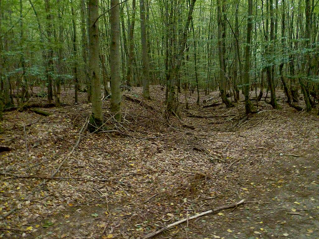 Das Wall-Graben-System der Hennethaler Landwehr abfotografiert